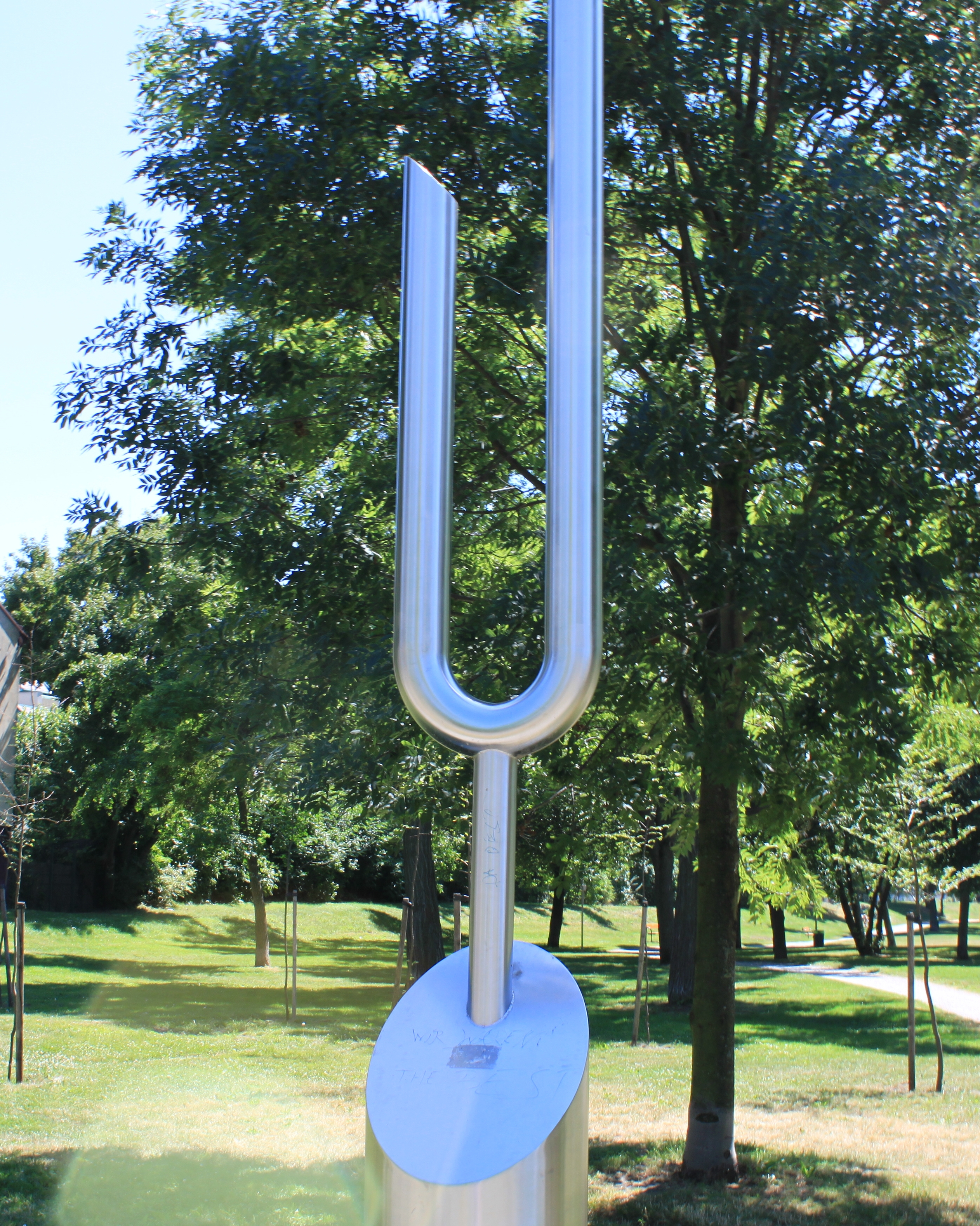 Skulptur des Beethovenwegs bei der Maria-Loretto-Kirche in Jedlesee.